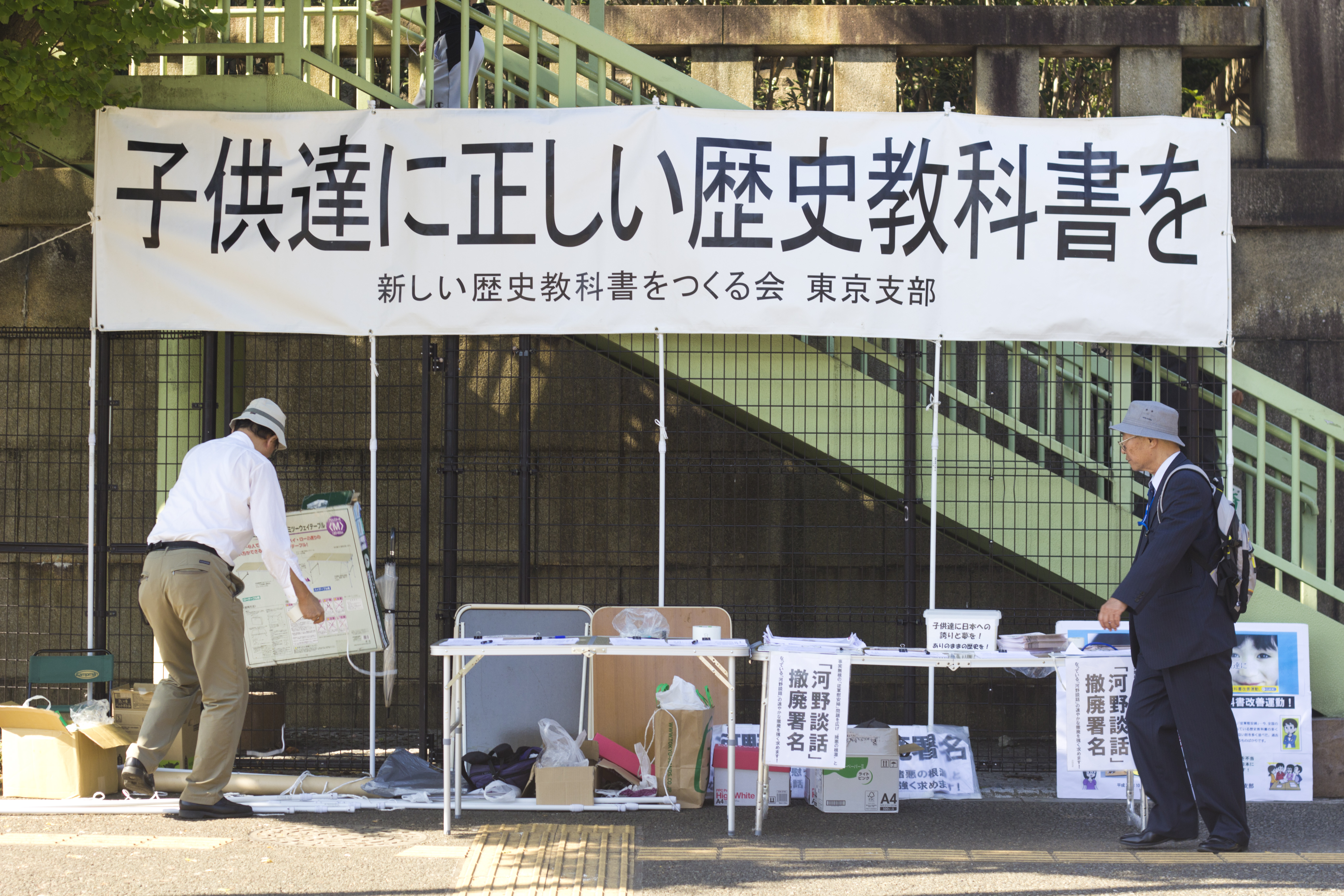 新歷史教科書編撰會東京支部在靖國神社前掛起標語「請給孩子提供正確史觀的歷史教科書」，要求日本政府撤廢河野談話。